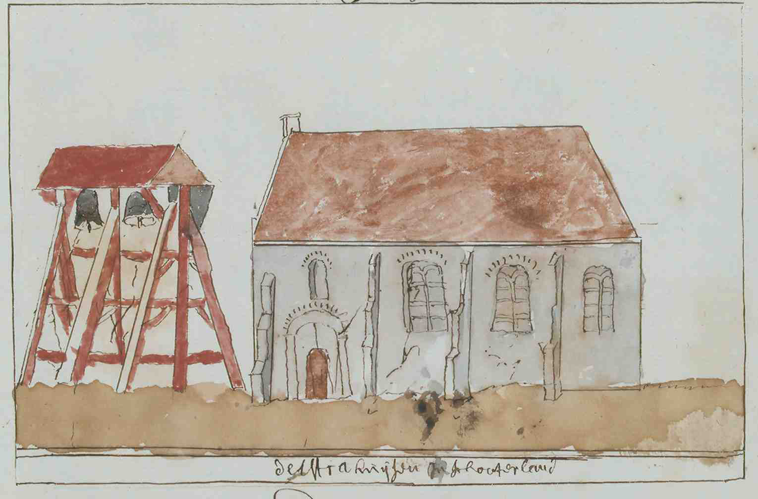 Korte Beschreijving van de Steden Dorpen Gehugten en Heeren-huizen der Heerlykheid Vriesland Benevens Desselfs Afbeeldingen Meest na 't leven getekent By een Vergaderdt Door Andries Schoemaker